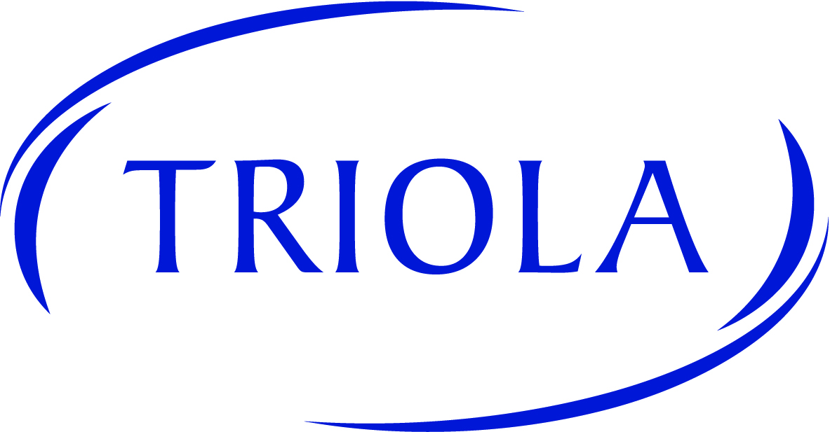 অসমীয়া: Triola logo